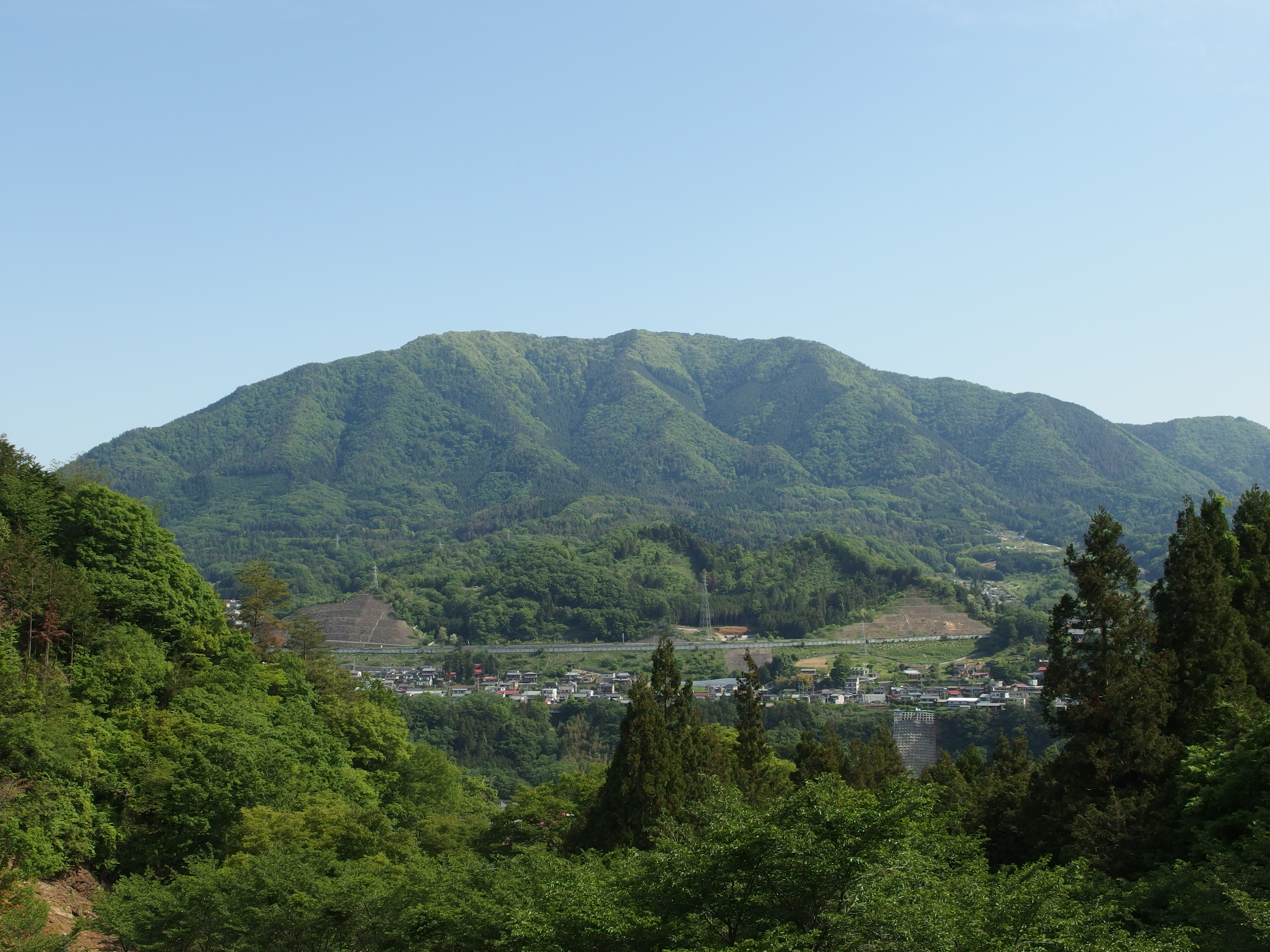 山梨県大月市と上野原市の境にある扇山を南から。